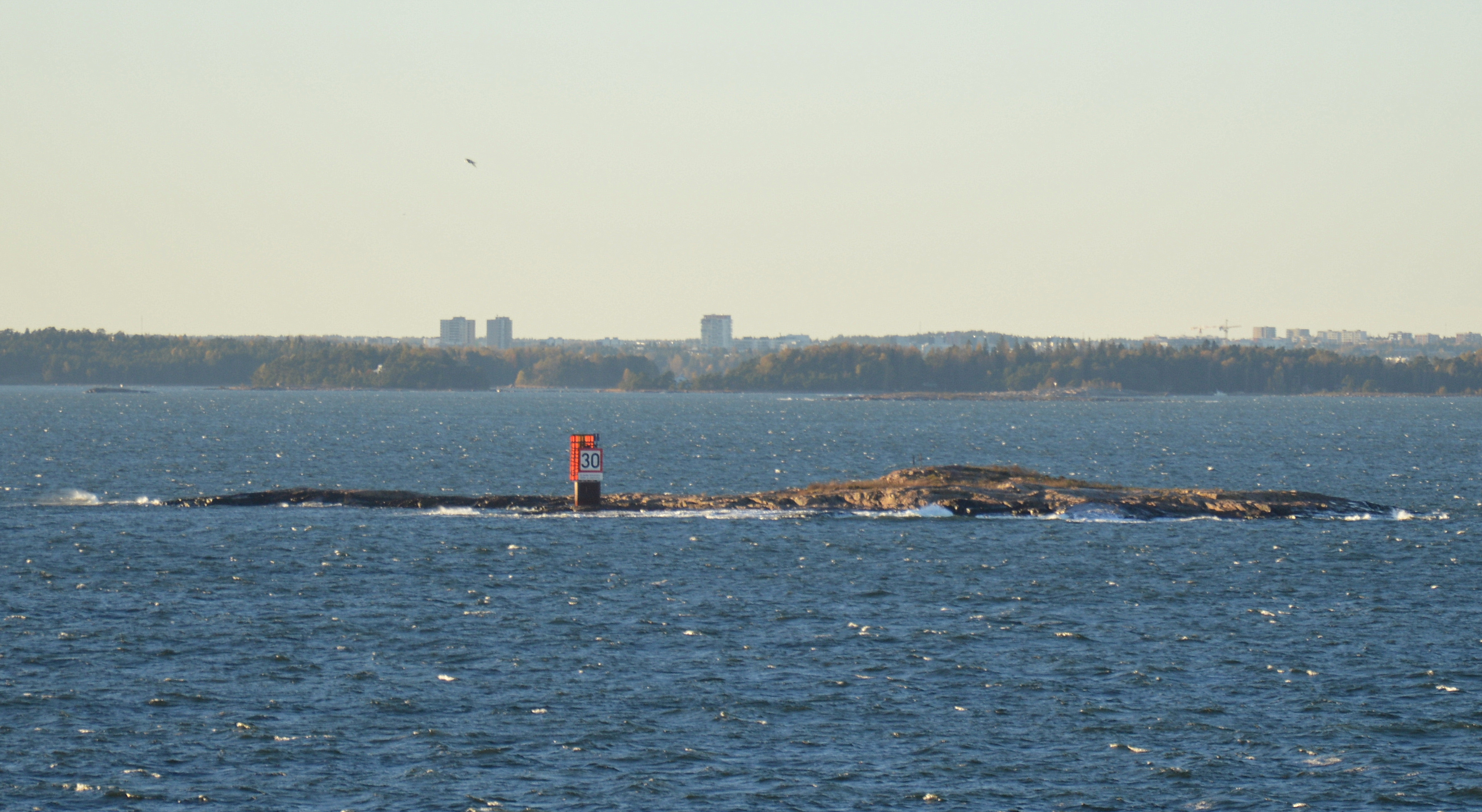 Insel Louekari vor Helsinki